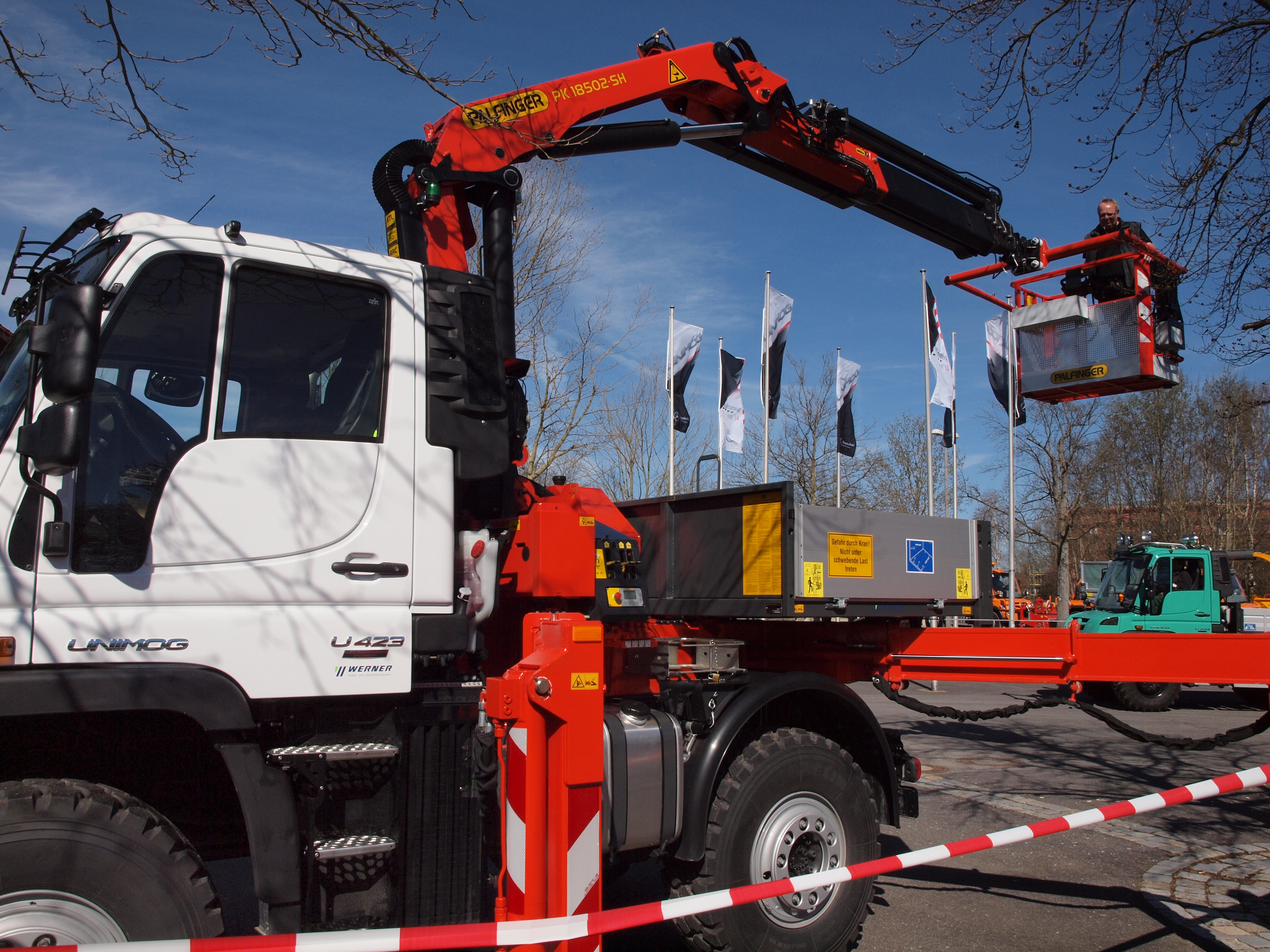 Palfinger Kran an einem Unimog U423 - bei einer Unimog-Tour 2014